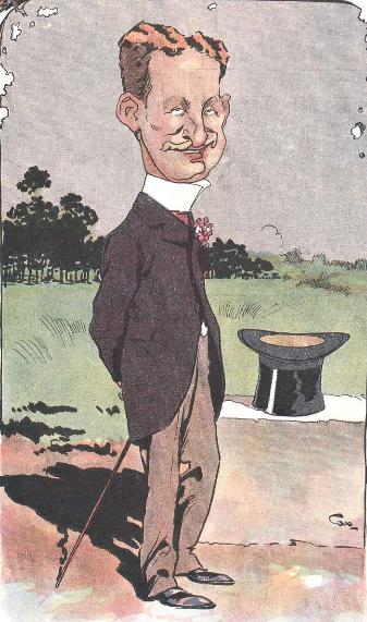 Caricatura del diputado por Buenos Aires Joaquín Samuel de Anchorena, futuro intendente de Buenos Aires.